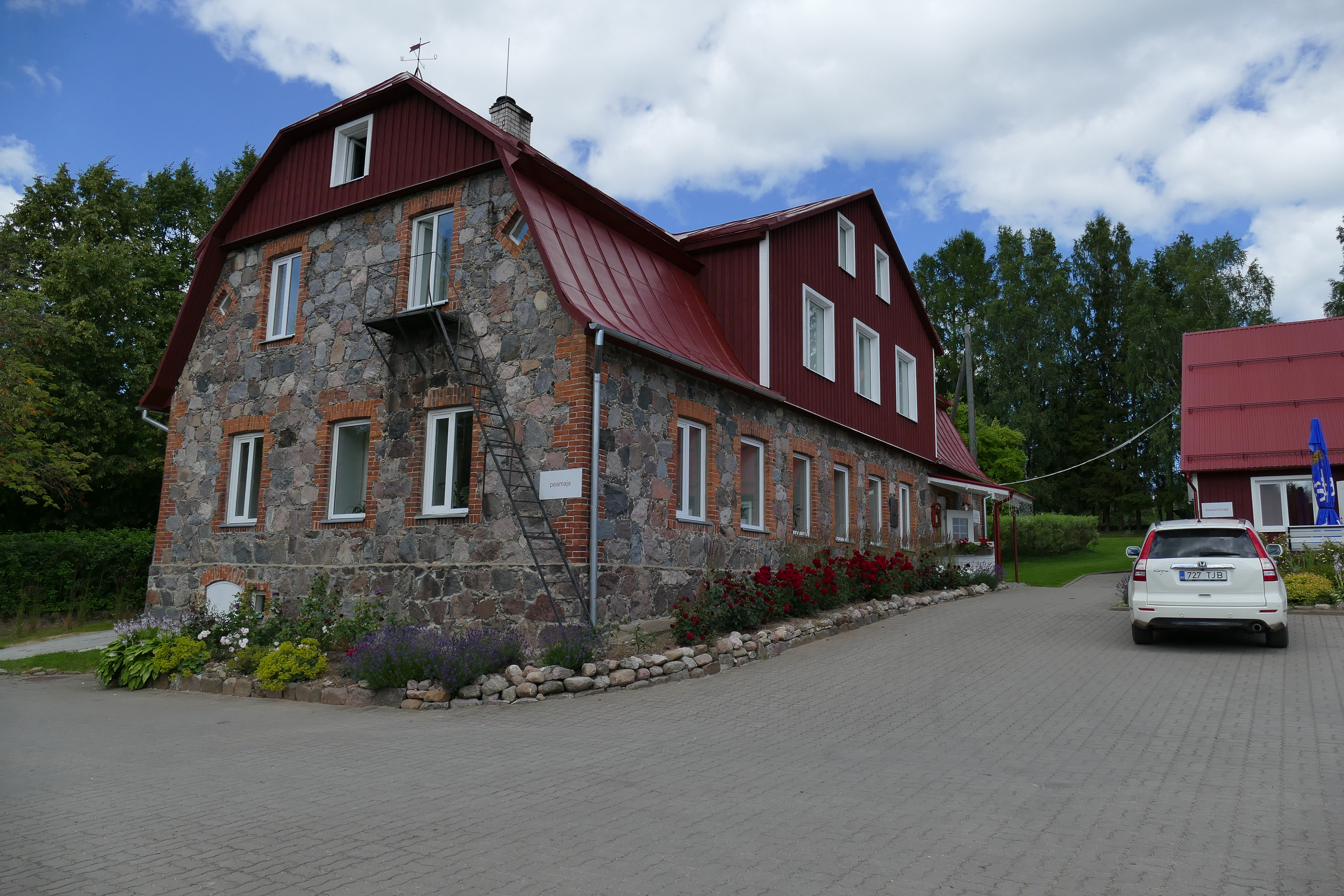 Voore külalistemaja peamaja, endine Leedimäe algkool